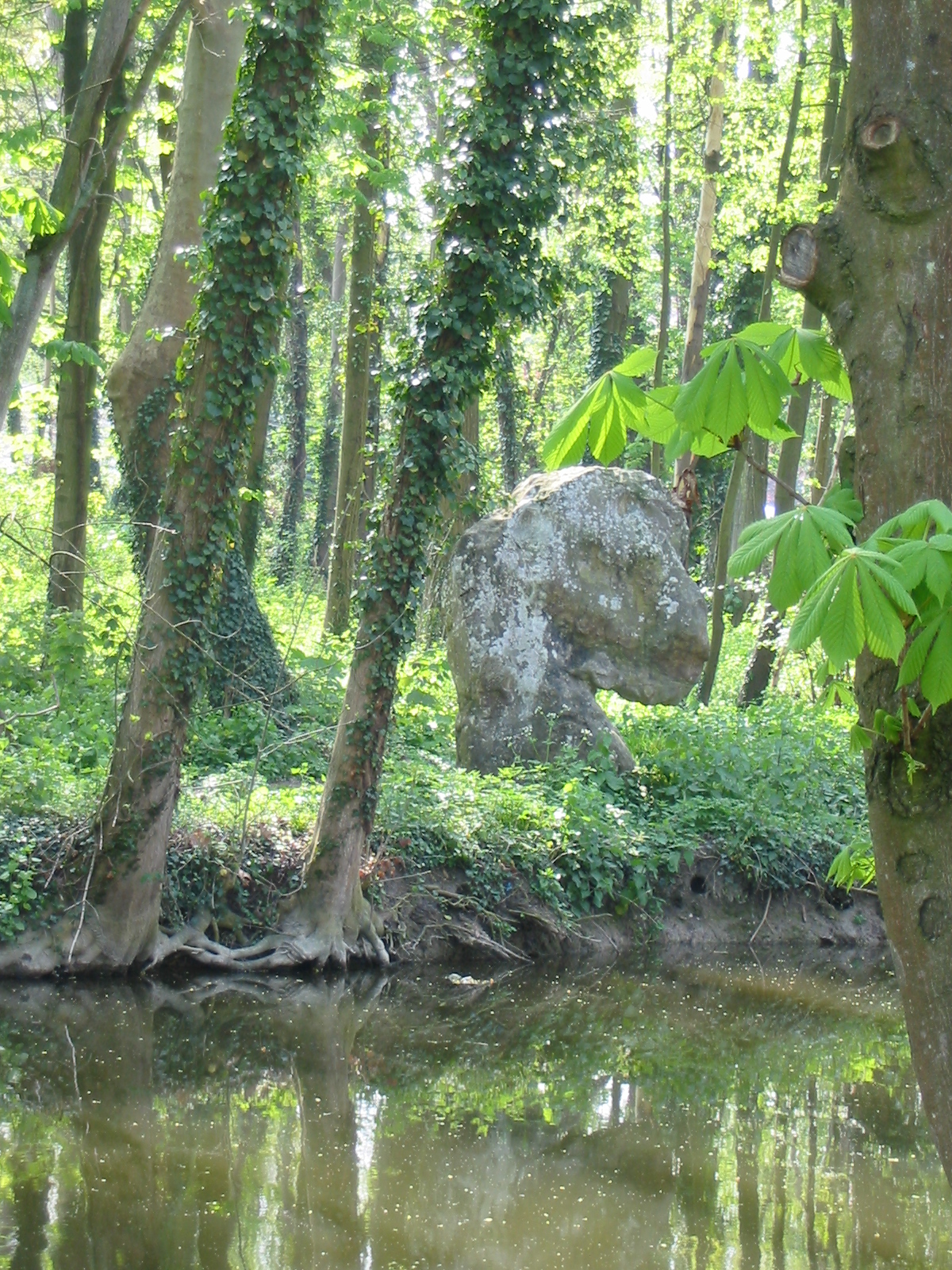 La Femme de Loth, menhir appartenant à l'un des deux alignements dits des Pierres Frittes à Brunoy (Essonne)